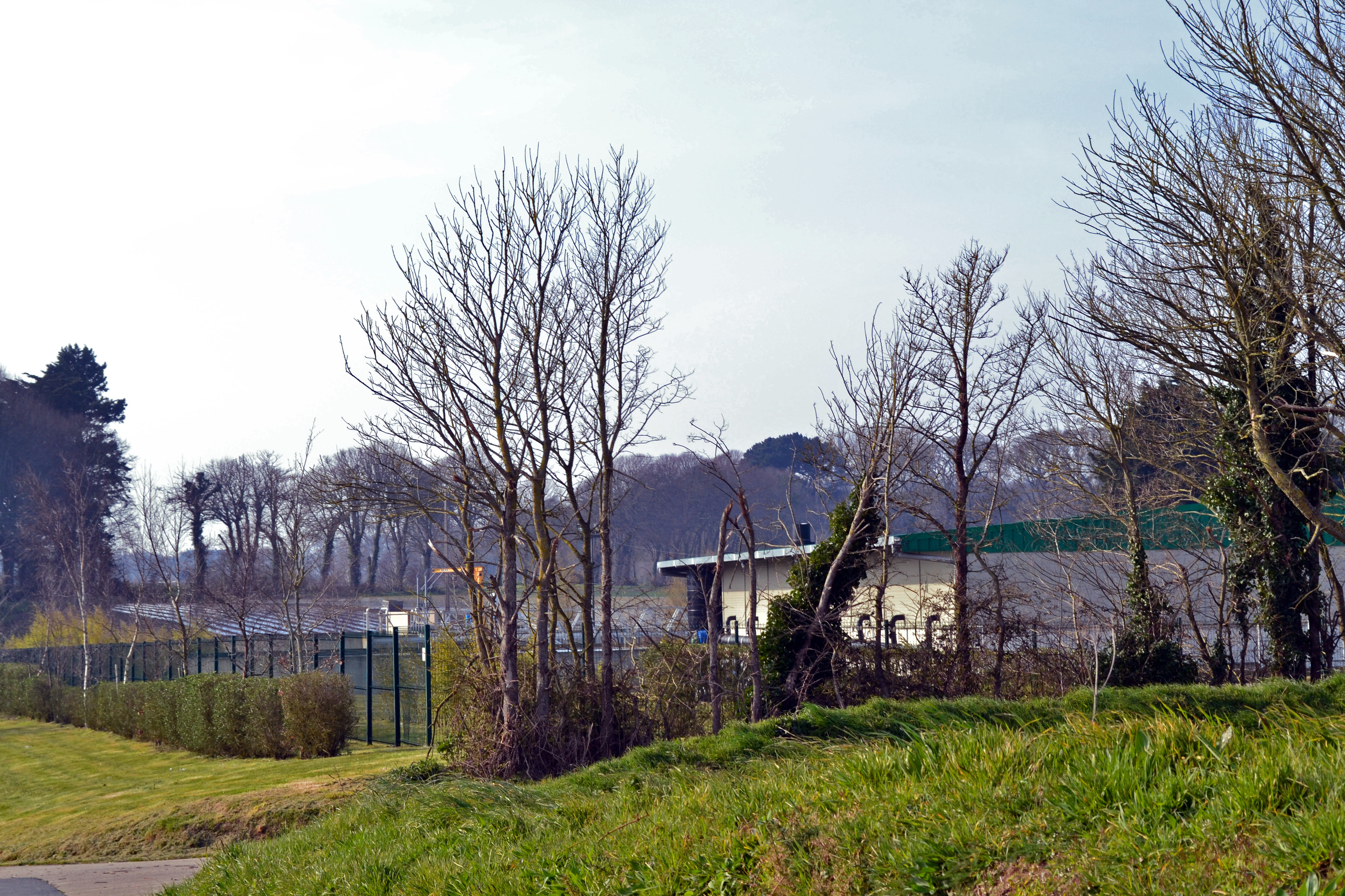 Station d'épuration à Vilin Vraz (Saint-Pol-de-Léon, Finistère).